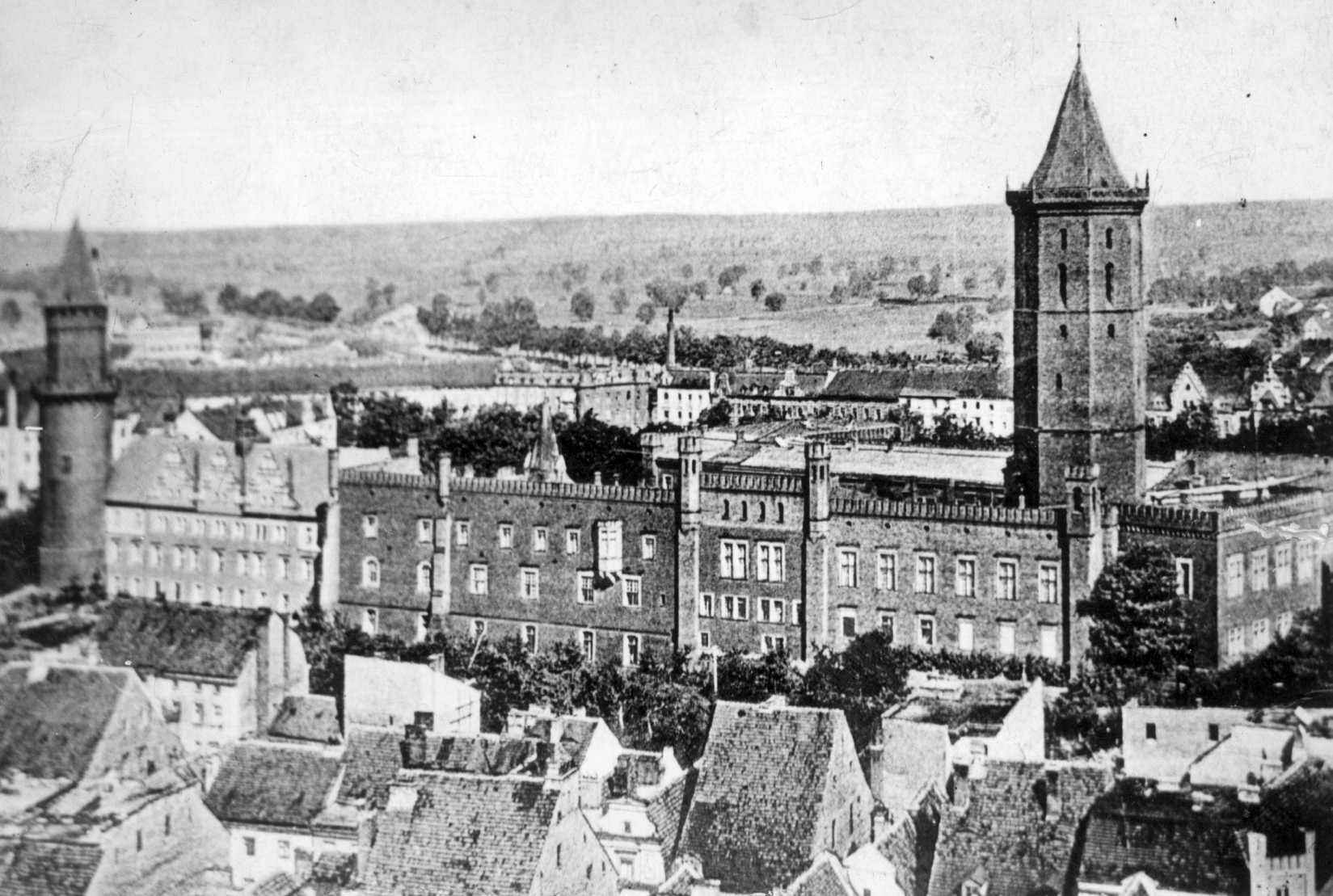 Castle in Legnica